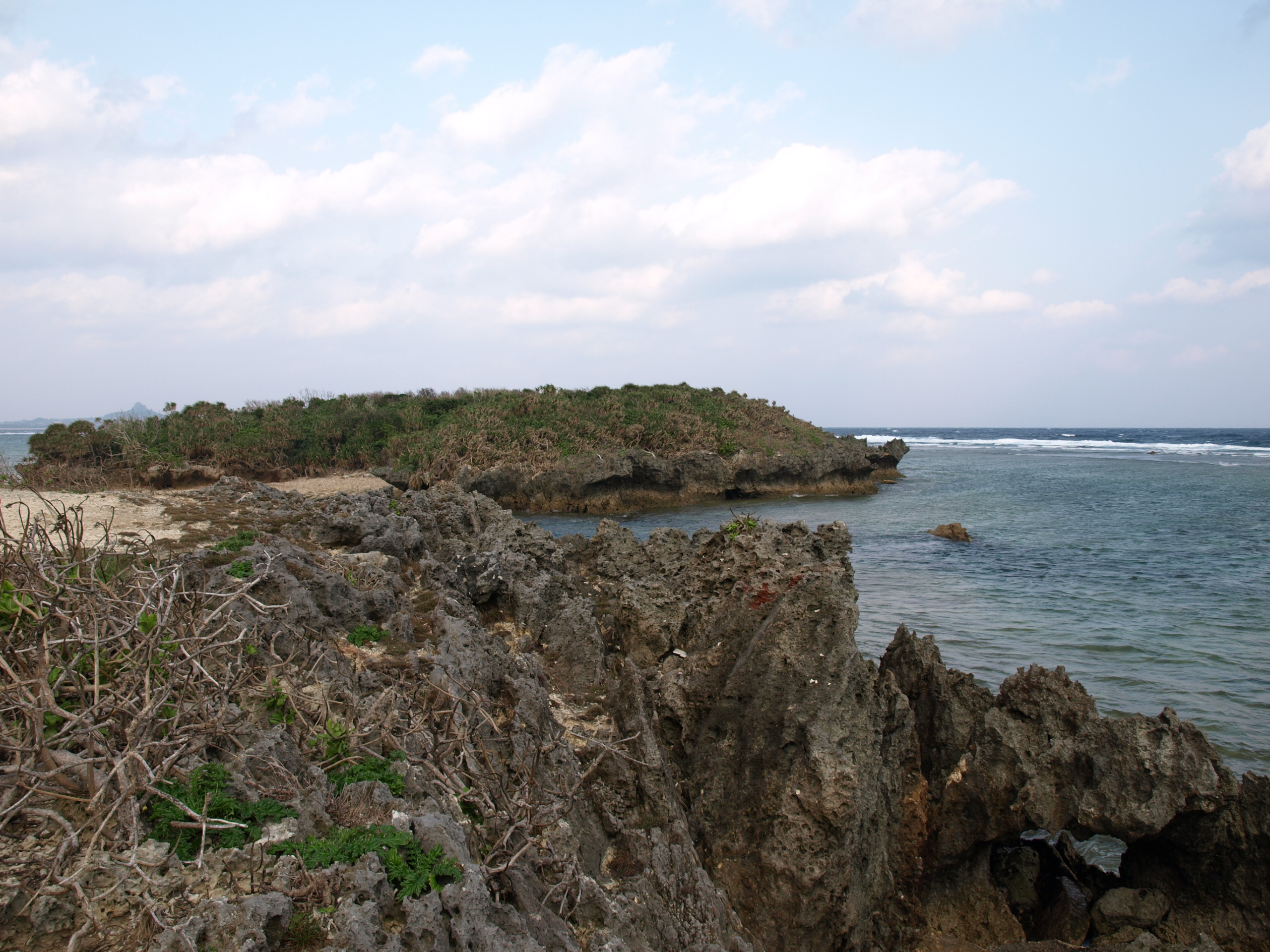 Cape Bise, Motobu Peninsula, Motobu, Okinawa Prefecture, Japan.